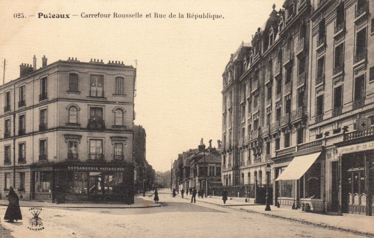 Puteaux.Carrefour Rousselle.Rue de la République